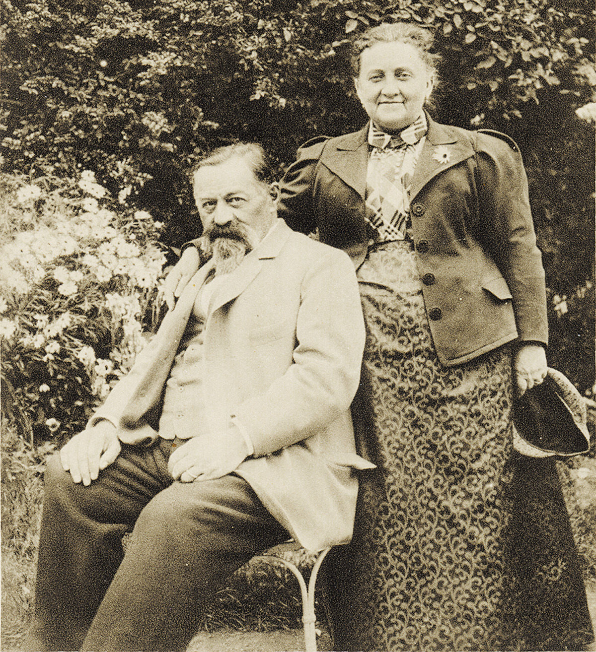 предприниматели России Генрих и Шарлотта Брокар